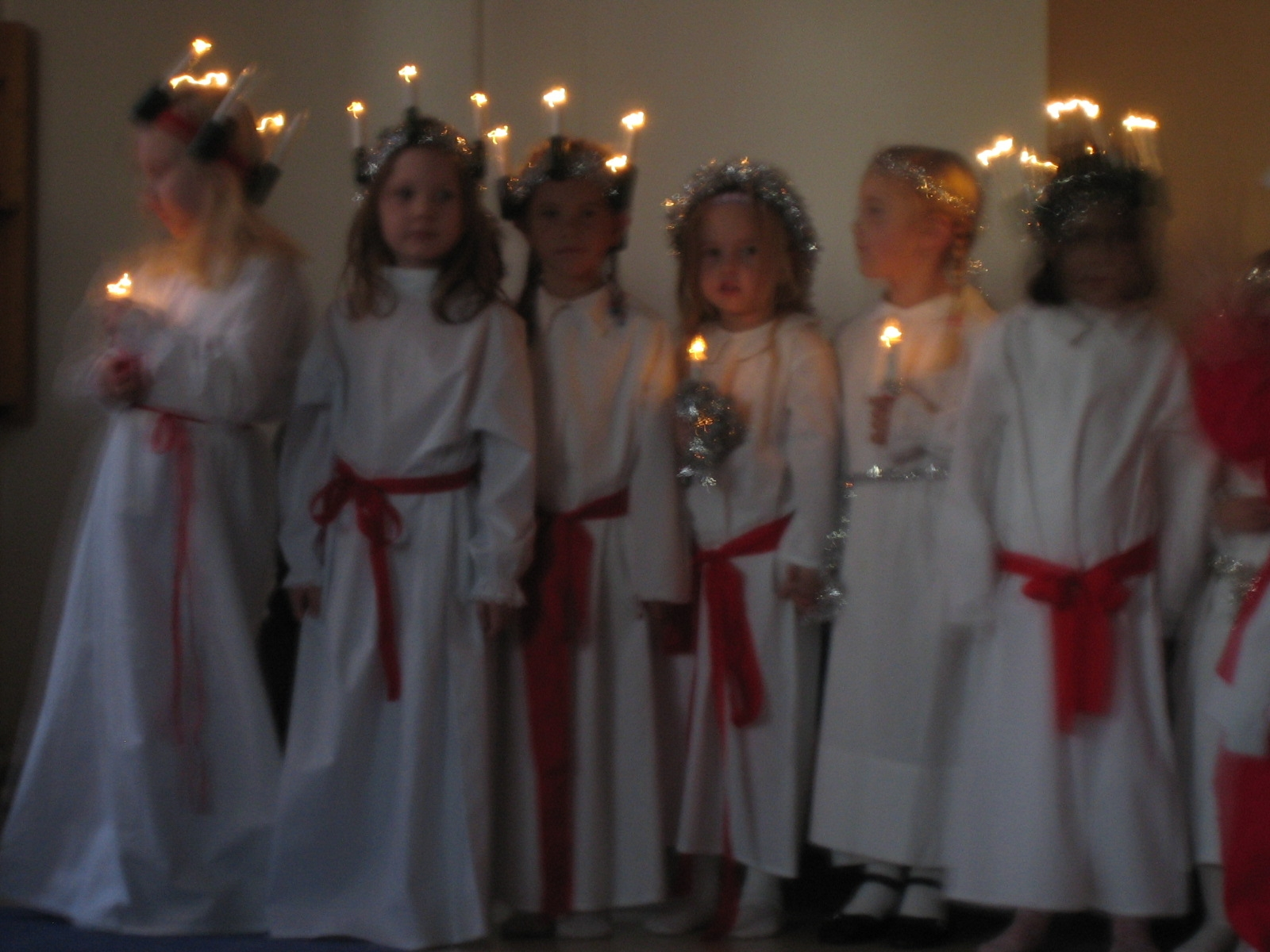 Kinder in einem Kindergarten in Schweden singen zur Feier des Luciatages traditionelle Lieder. Bild selbst erstellt am 13. Dezember 2005.